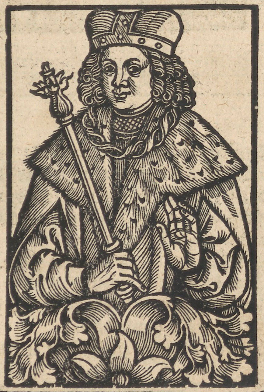 Беларуская (тарашкевіца): Уяўны партрэт князя Уладзімера Альгердавіча (Uładzimier Algierdavič)